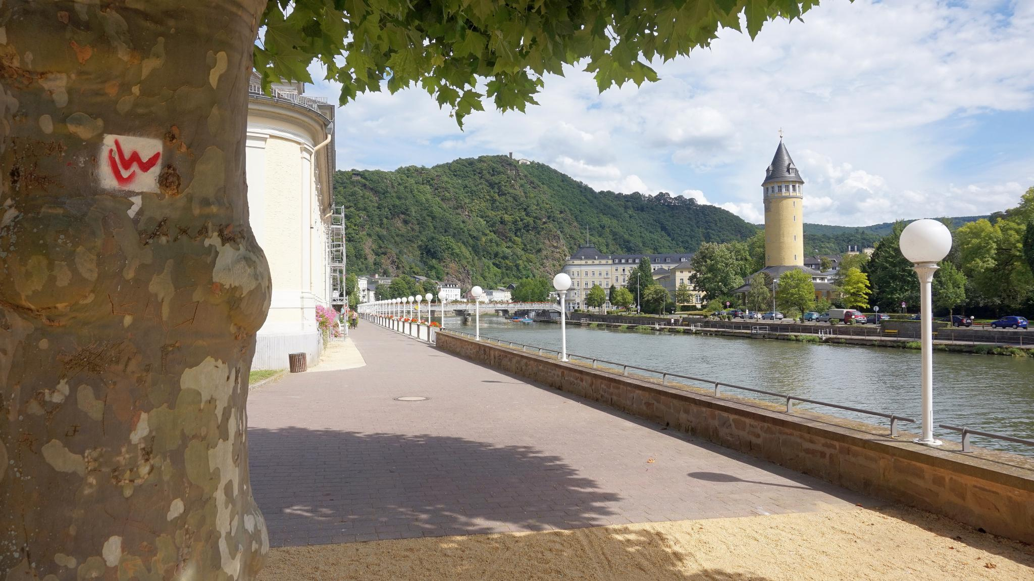 Blick die Jacques-Offenbach-Promenade in Bad Ems (Rhein-Lahn-Kreis, Deutschland) entlang und über die Lahn auf den Quellenturm und das Statistische Landesamt. Blickrichtung Südosten, Standort Spielbank auf einem Abschnitt des Lahnwanderwegs.